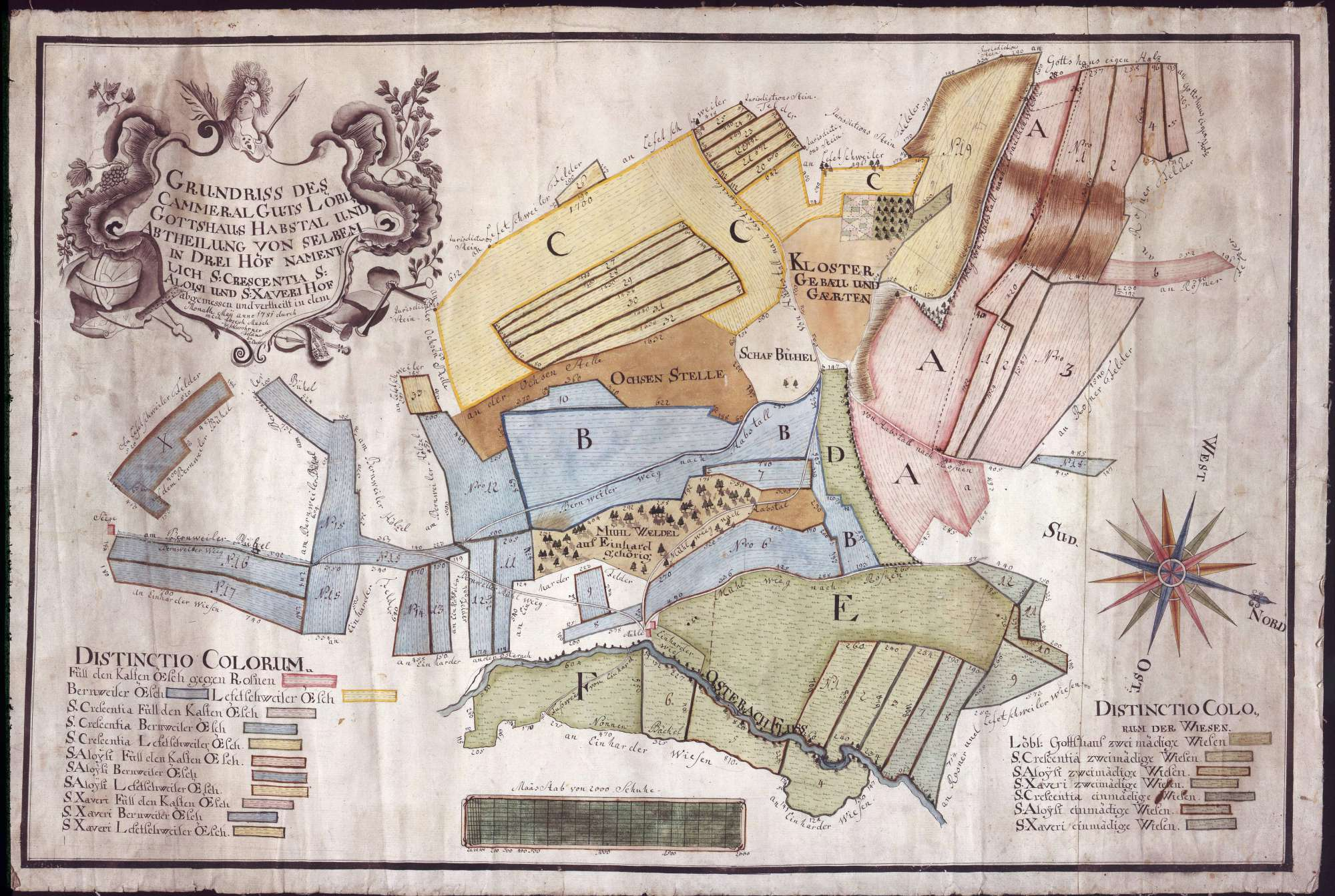 Deutschland (D) - Baden-Württemberg (BW) - Landkreis Sigmaringen (SIG) - Ostrach: Karte "Grundriss des Kameralgutes Habsthal und Abteilungen desselben in drei Höfen, namentlich St. Crescentia-, St. Aloisi- und St. Xaveri-Hof" Quelle/Sammlung: Landesarchiv Baden-Württemberg, Abt. Fürstlich Hohenzollernsches Haus- und Domänenarchiv (Dep. 39) / 786-2002 Archivaliensignatur: Alt-/Vorsignatur: Maße: 47 x 70 cm (Höhe x Breite) Bemerkungen: Identifikator: FAS K Nr. 33 Online-Findbuch im Angebot des Archivs